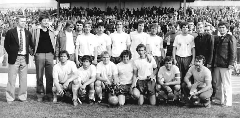 ADN-ZB-Mittelstädt-17.5.80-ma-Berlin: FC Carl Zeiss Jena Pokalsieger. Zum viertenmal nach 1960, 1962 und 1974 gewann der FC Carl Zeiss Jena (im Foto kurz nach dem Endspielsieg) den FDGB-Fußballpokal. Im Stadion der Weltjugend in Berlin entschieden die Jenaer das diesjährige Finalspiel gegen den FC Rot-Weiß Erfurt mit 3:1 (1:1, 0:1) nach Verlängerung zu ihren Gunsten.